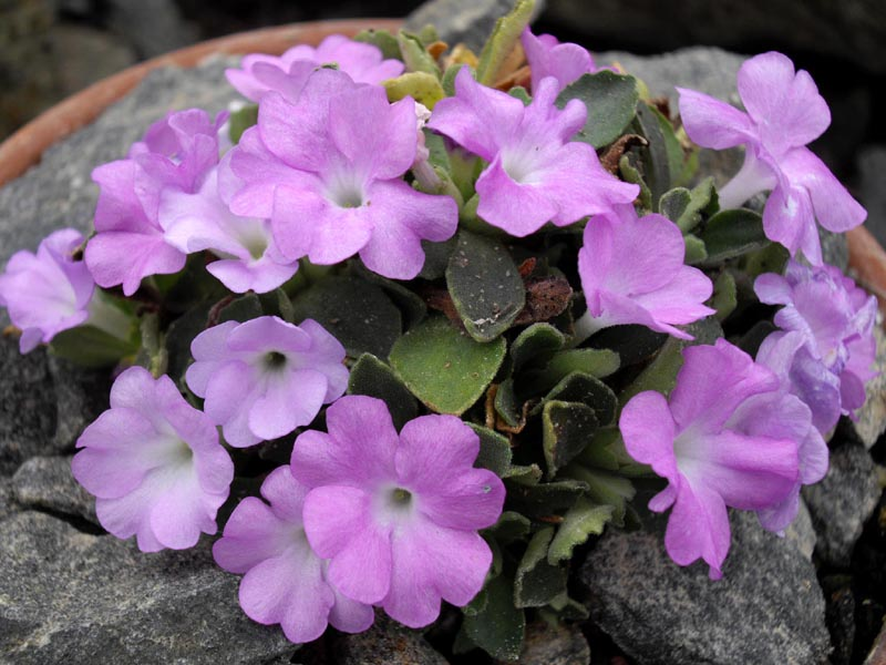 Primula allionii 'HNG12'